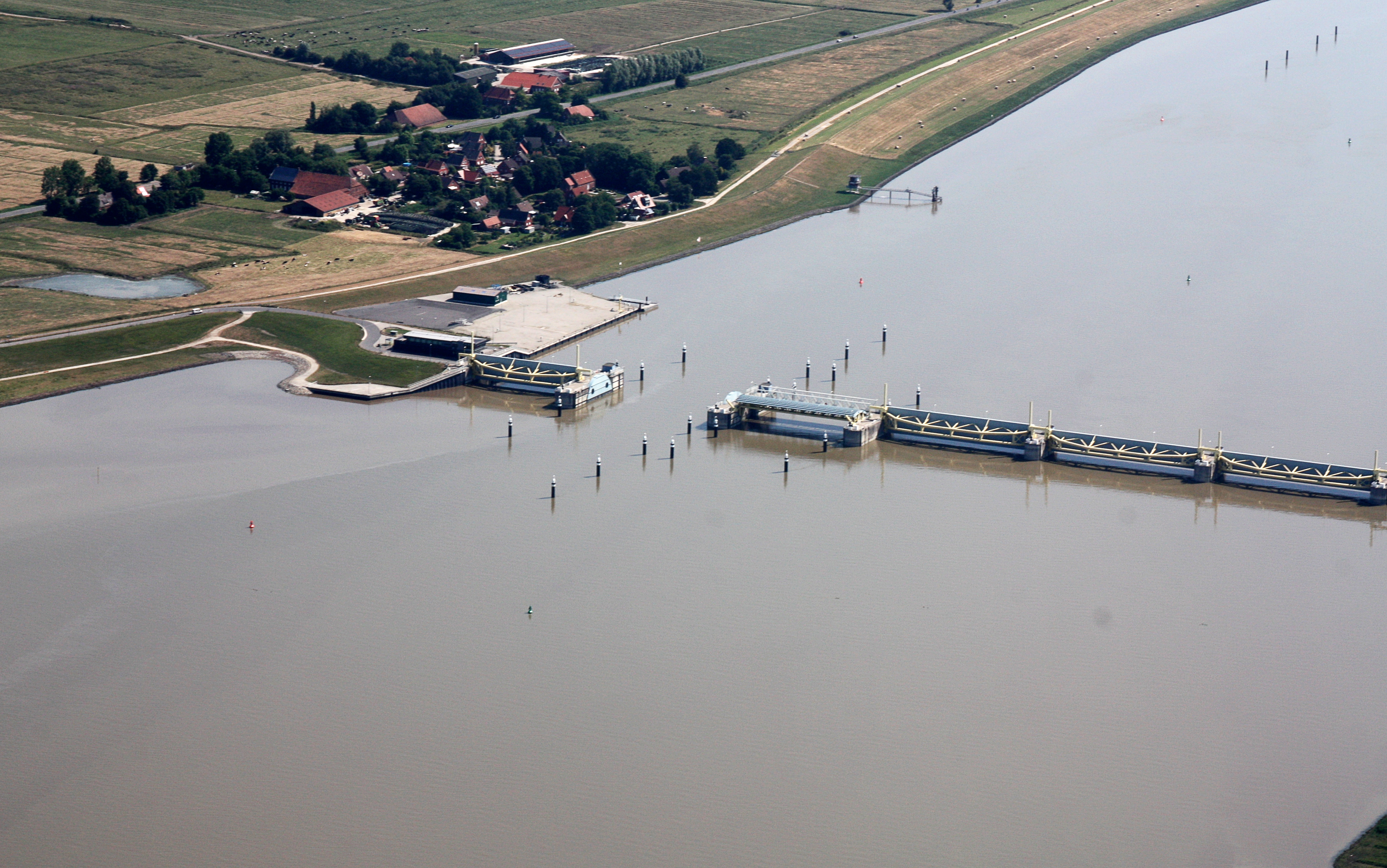 Luftaufnahme; Flug von Leer nach Emden; Flughöhe 1500 ft; Juli 2010; Originalfoto bearbeitet: Tonwertkorrektur und Bild geschärft mit Hochpassfilter